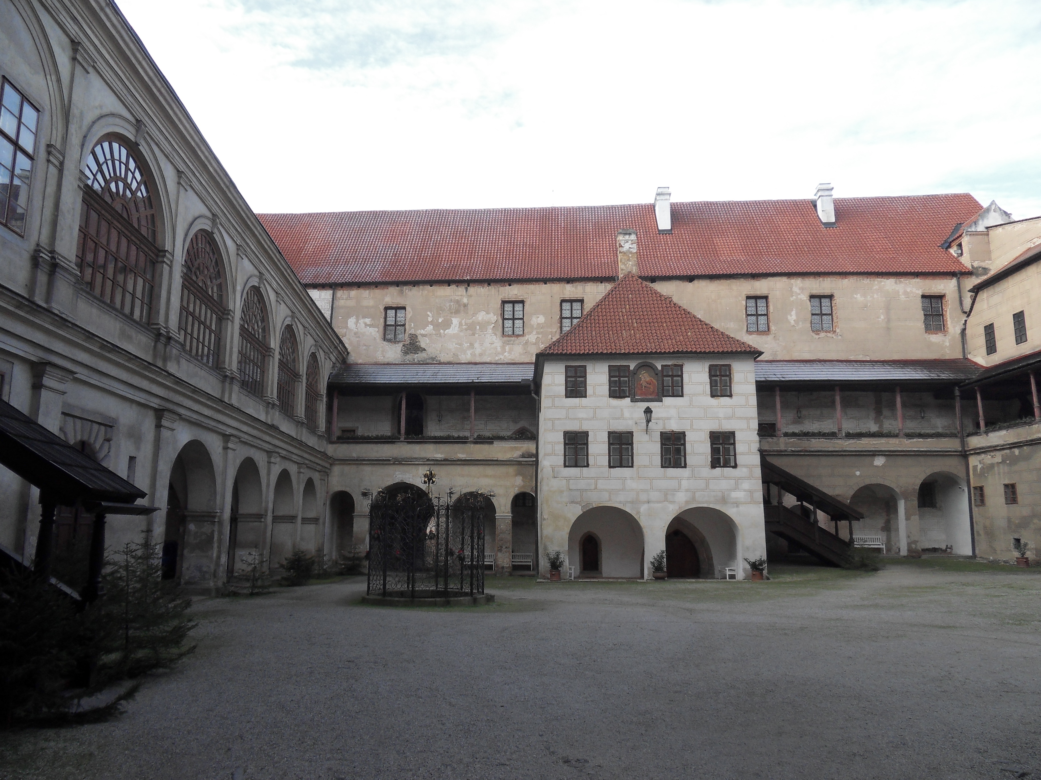 Zámek Horšovský Týn - pohled na zámecké nádvoří